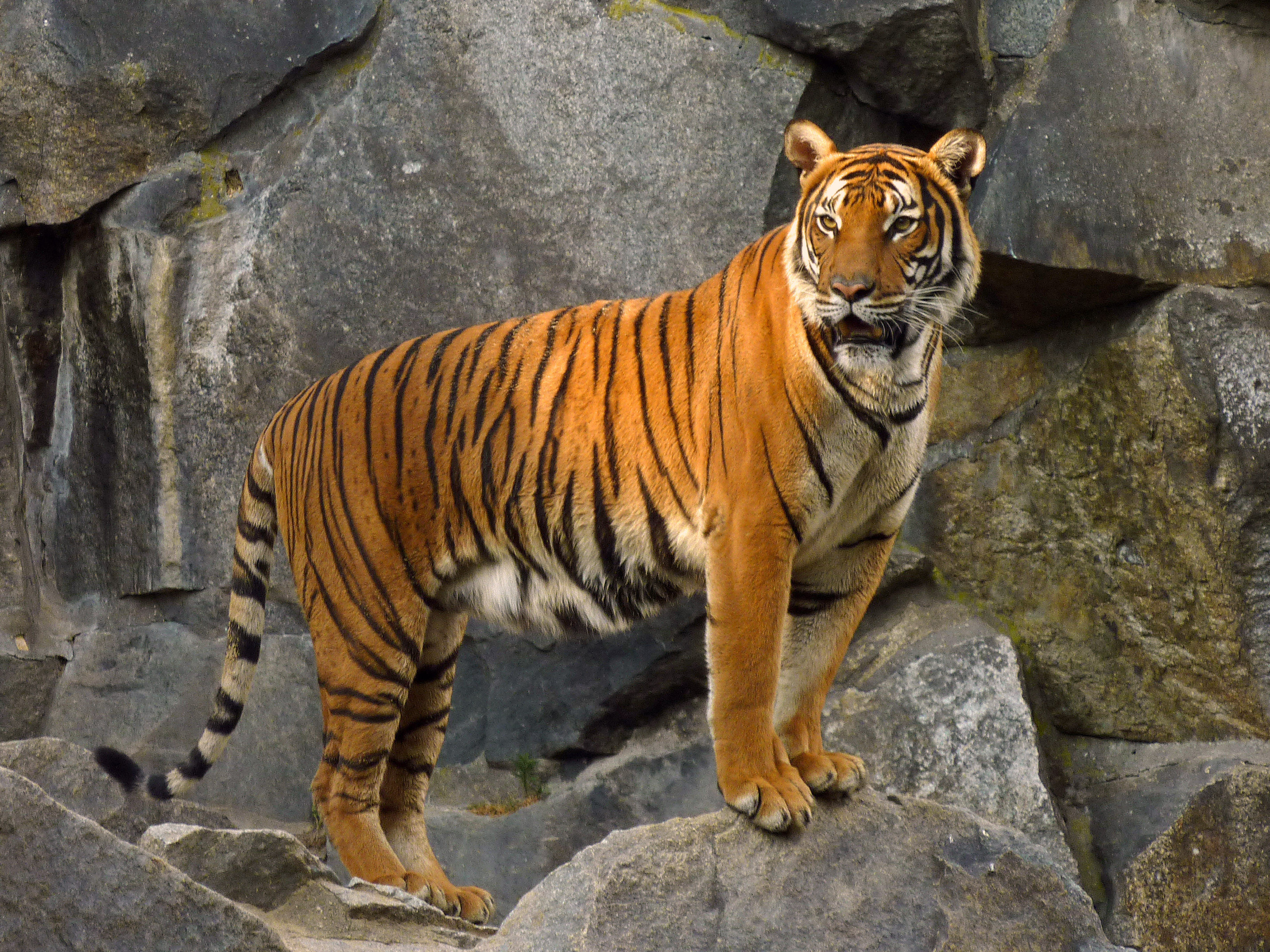 Hinterindischer Tiger (Indochina-Tiger) in der großen westlichen Freianlage am Alfred-Brehm-Haus des Tierparks Berlin (Friedrichsfelde)